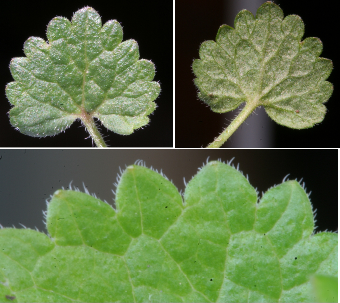 Glechoma_hederacea (Ellera terrestre comune Località: Pasa, Sedico (BL), 356 m s.l.m